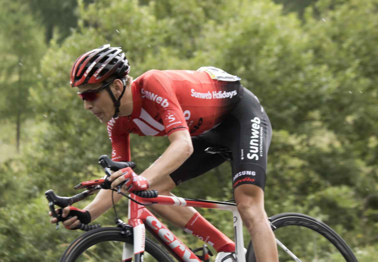 ALP10044 kamna